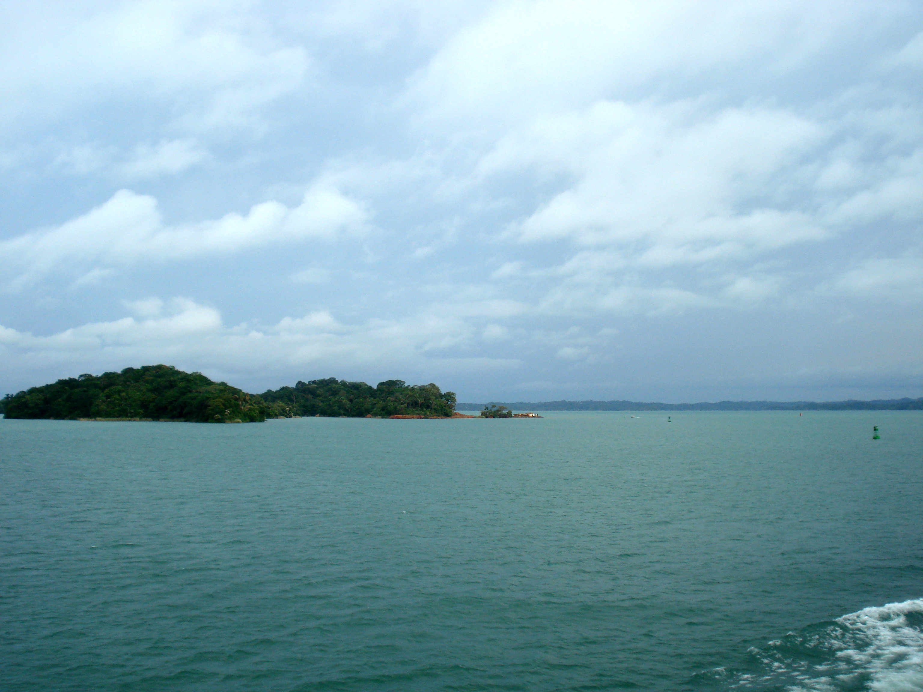 Islas In Gatun Lake